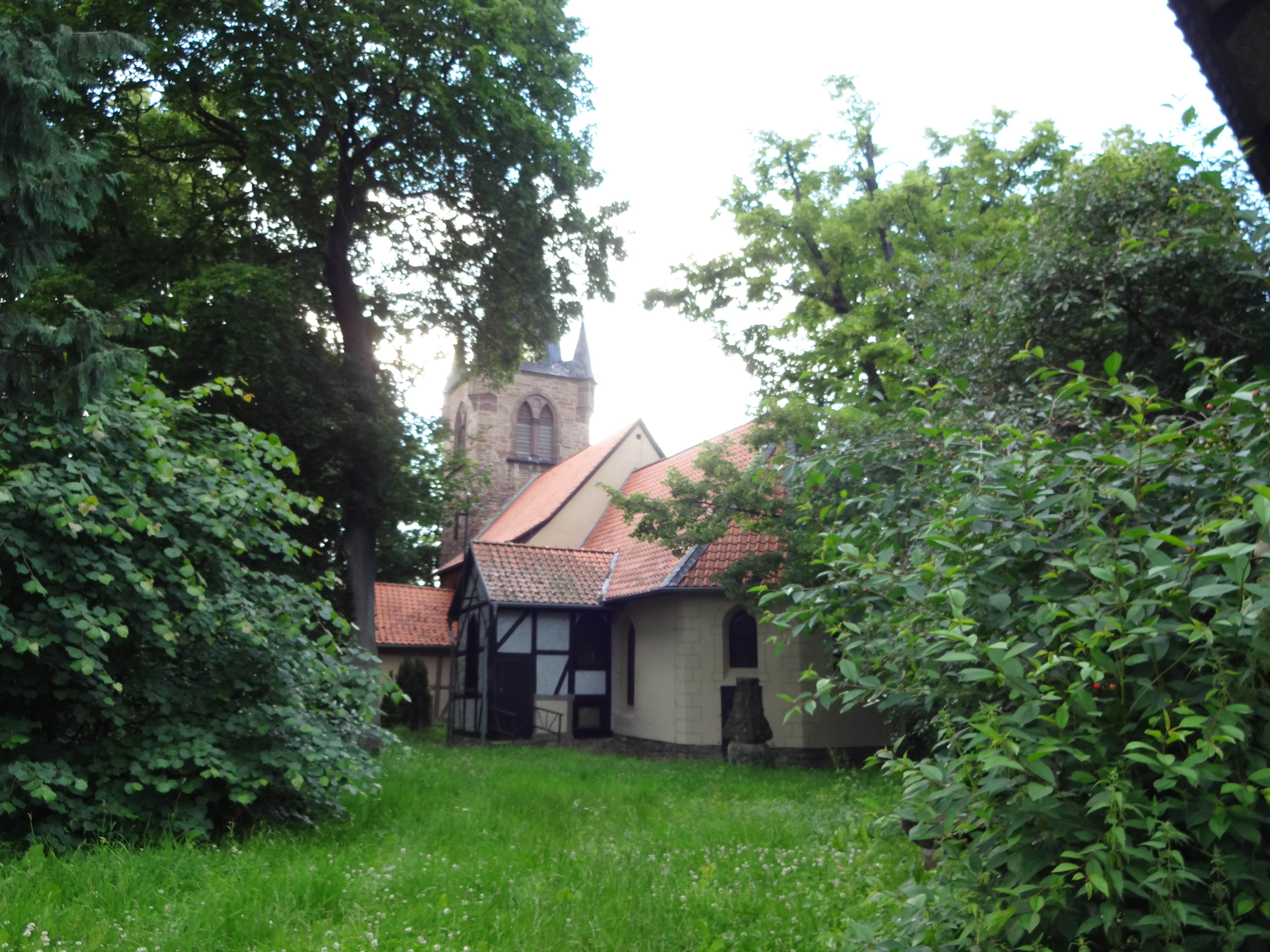 Dorfkirche in Silstedt